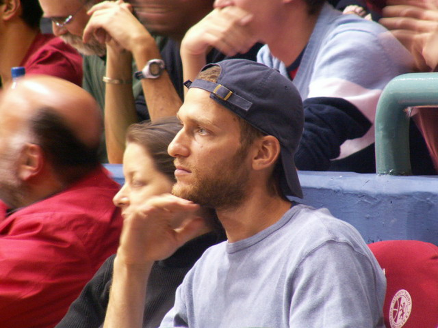 דורון שפר בקהל, מלחה, 2005/6